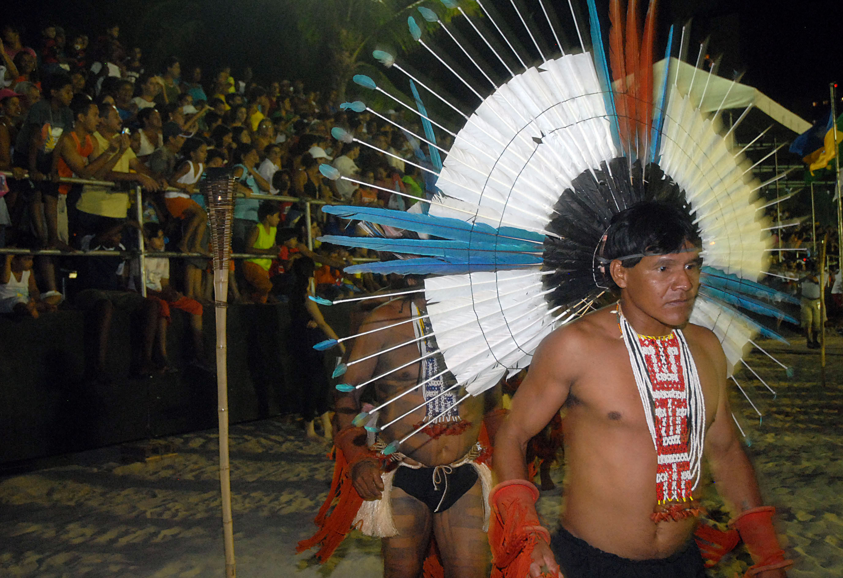 Cerimônia de encerramento da nona edição dos Jogos dos Povos Indígenas (Olinda PE)